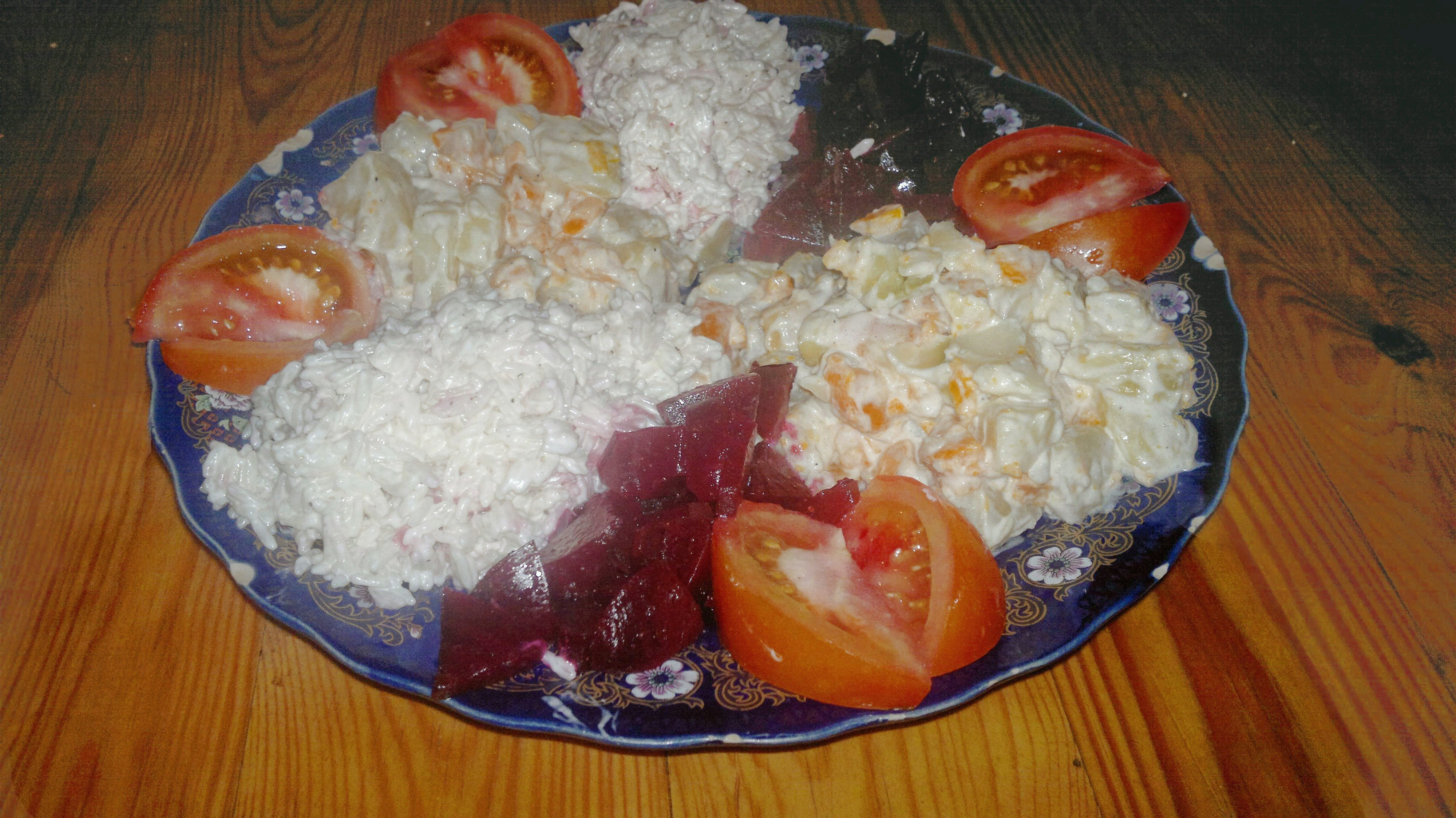 سلطة بالطماطم والأرز والبطاطس المسلوقة والقليل من الميونيز This is an image of food from Morocco